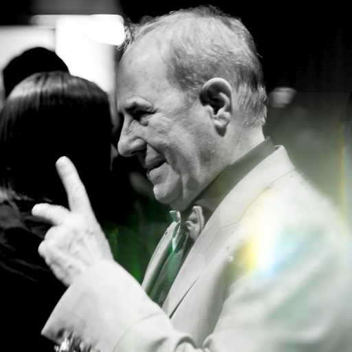 Joaquin Molpeceres Sanchez durante un acto benéfico en la Comunidad de Madrid